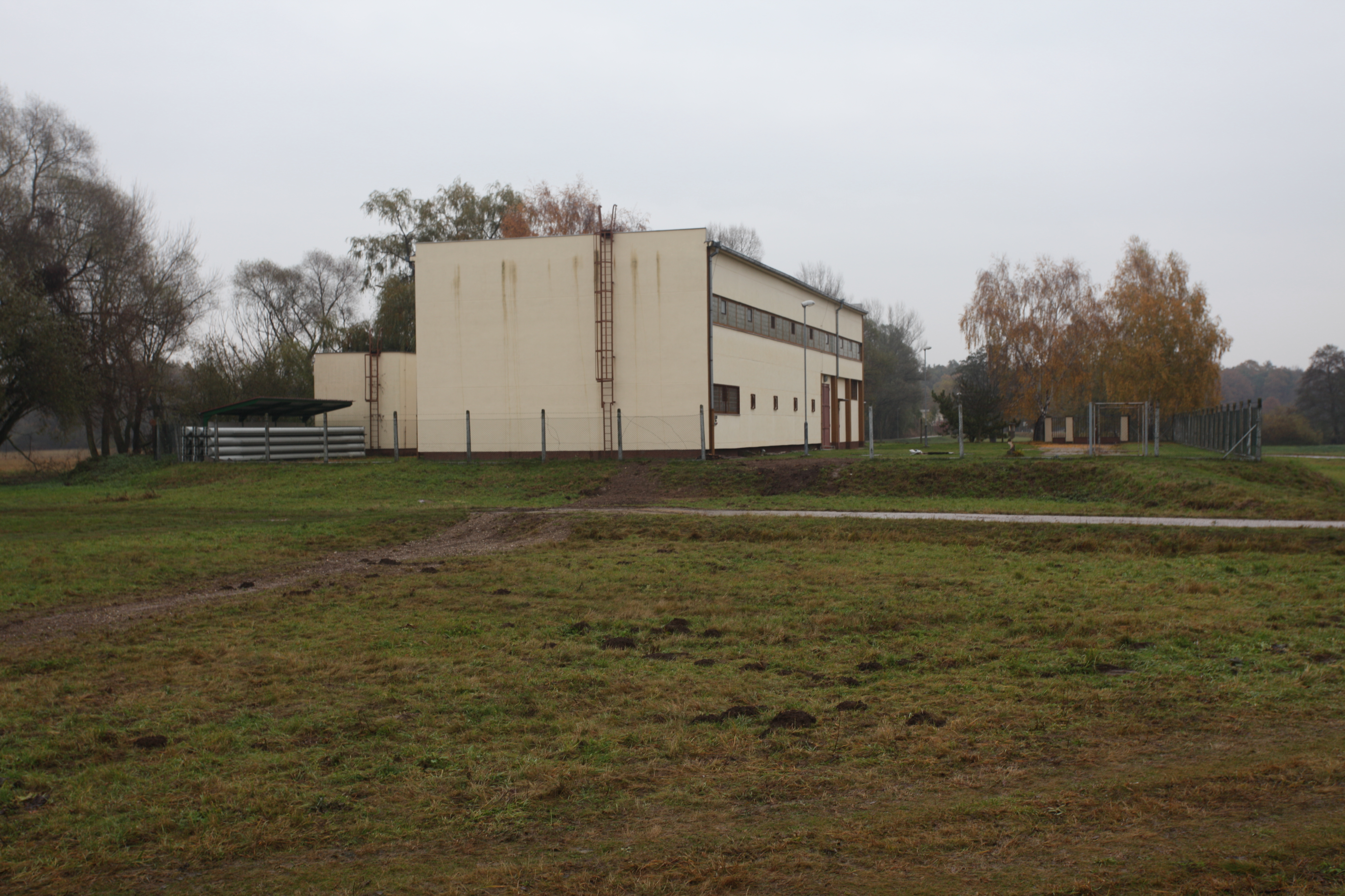 Čerpací stanice surové vody - čerpání na úpravnu vody. Úpravna surové jizerské vody s pískovými rychlofiltry slouží k rychlému pročištění surové vody, načerpávané z řeky Jizery. Voda dále pokračuje do vsakovacích nádrží, kde se vsakuje do štěrkopískového podloží. Po asi 40 dnech doputuje do sběrných studní, odkud je pod tlakem vyčerpána a potrubím dopravena k další úpravě granulovaným chlórem.